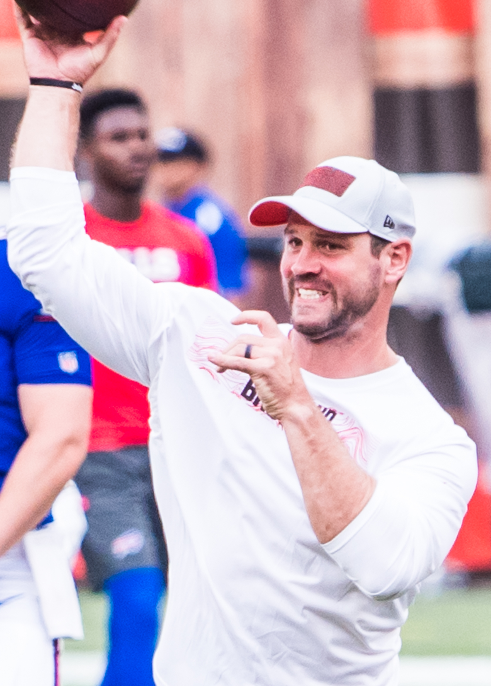 Drew Stanton